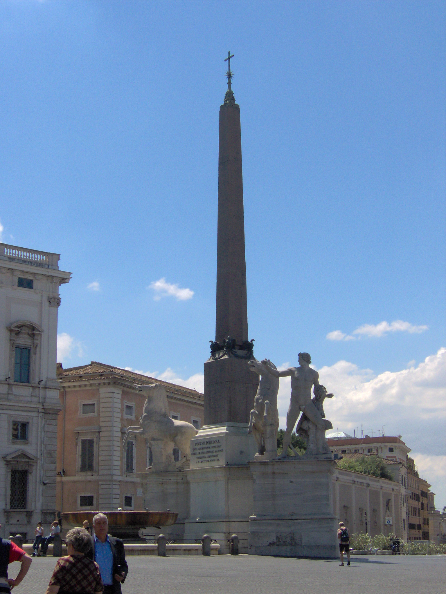 Quirinale, Fontana dei Dioscuri - Roma